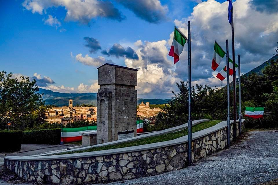 Monumento ai caduti This is a photo of a monument which is part of cultural heritage of Italy.